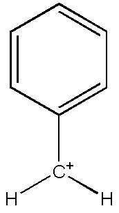 Cátion/radical benzil